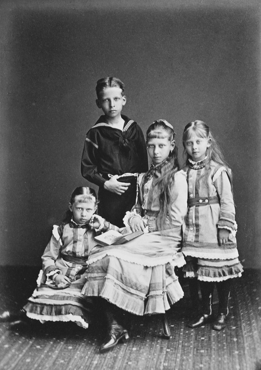 Die vier jüngsten Kinder des deutschen Kaisers Friedrich III (drei Schwestern von Wilhelm II), vlnr: Prinzessin Sophie von Preußen (* 14. Juni 1870) Prinz Waldemar von Preußen (* 10. Frbruar 1868) Prinzessin Victoria von Preußen (* 12. April 1866) Prinzessin Margarethe (* 22. April 1872)